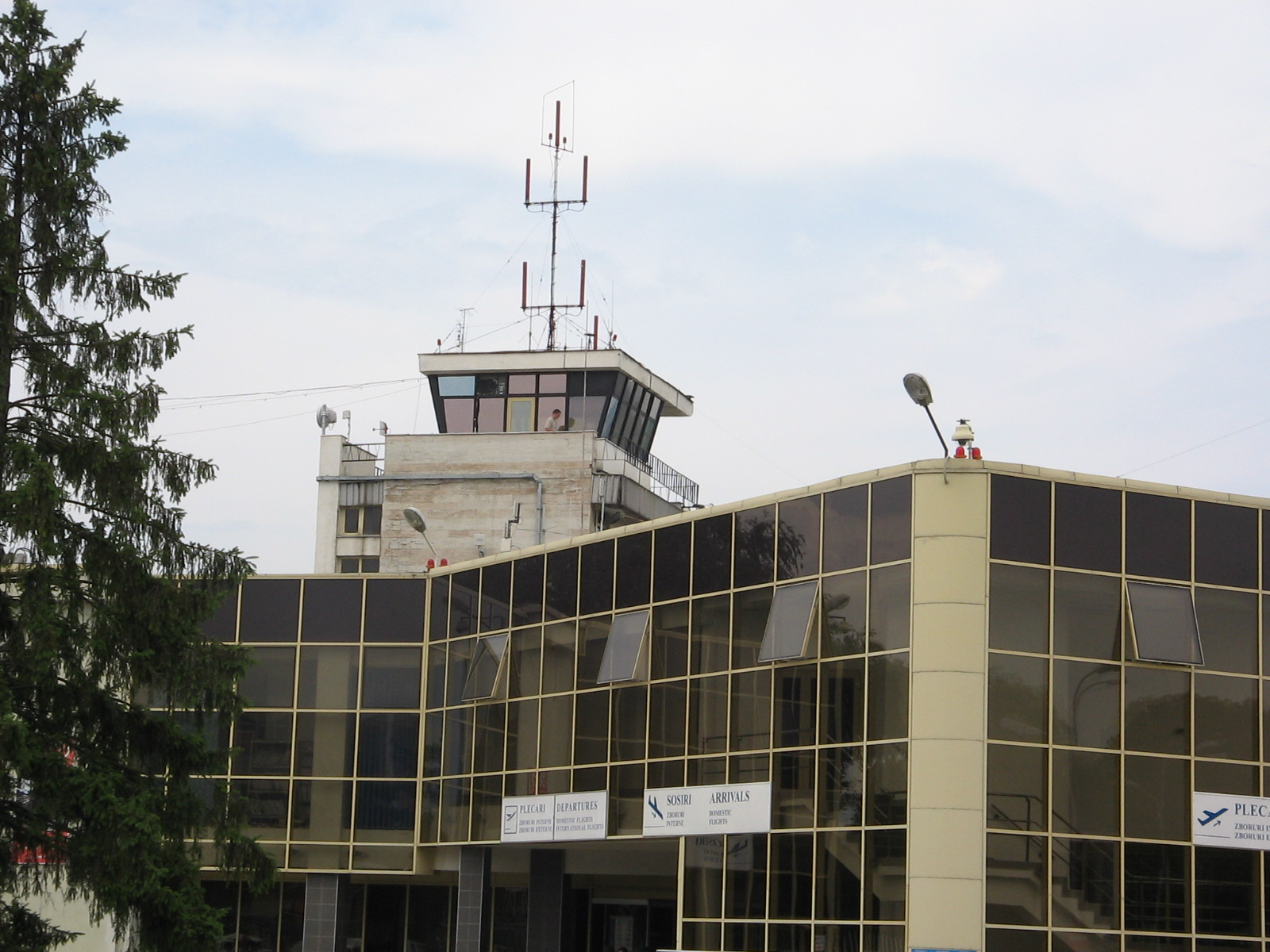 Aeroport Cluj-Napoca